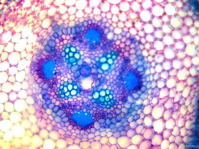 Racine primaire de Phaseolus (haricot)